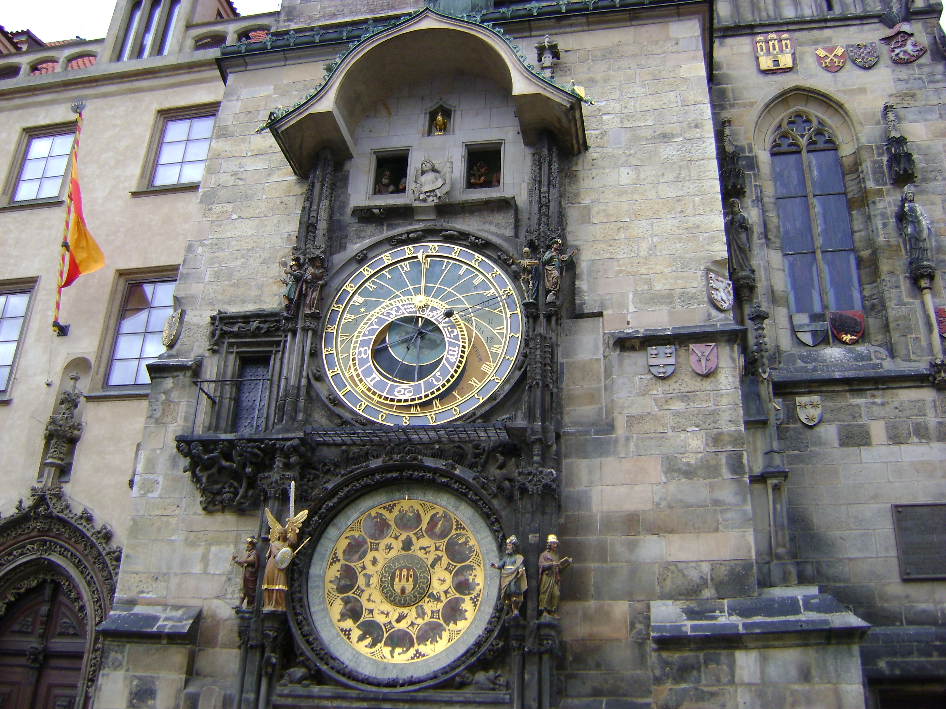 Староміський орлой.